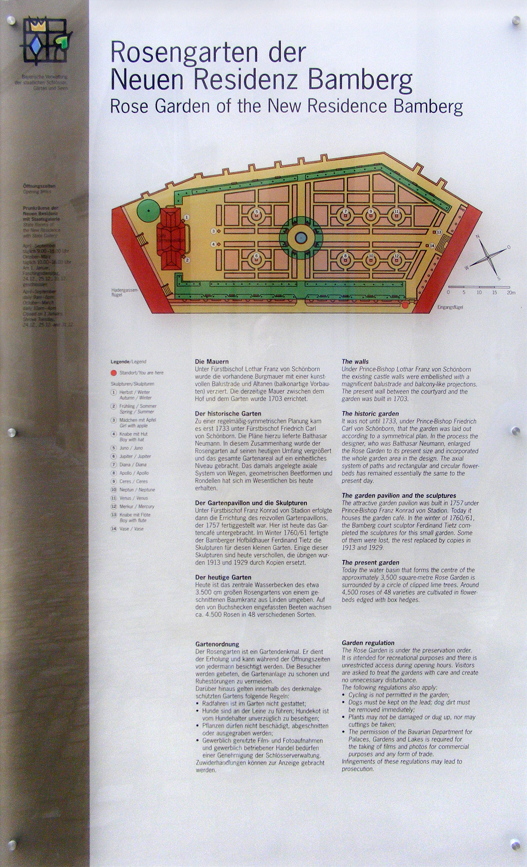 Rosengarten der Neuen Residenz Bamberg - Schild.